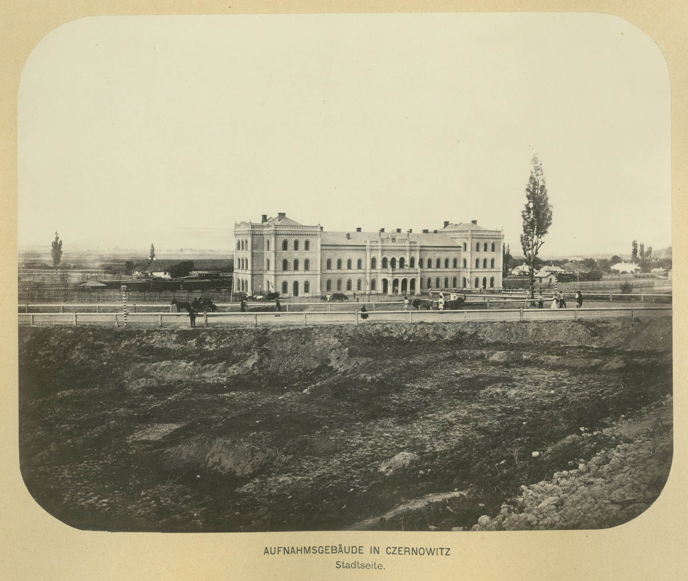 Старий Чернiвецький вокзал (1868)